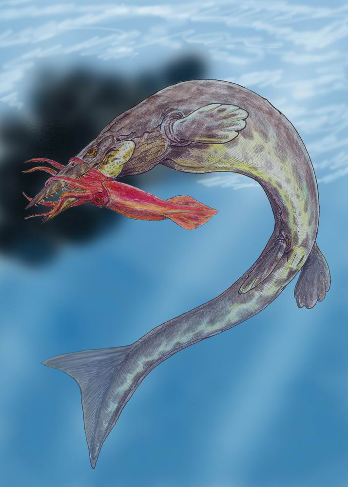 Hainosaurus catching a squid